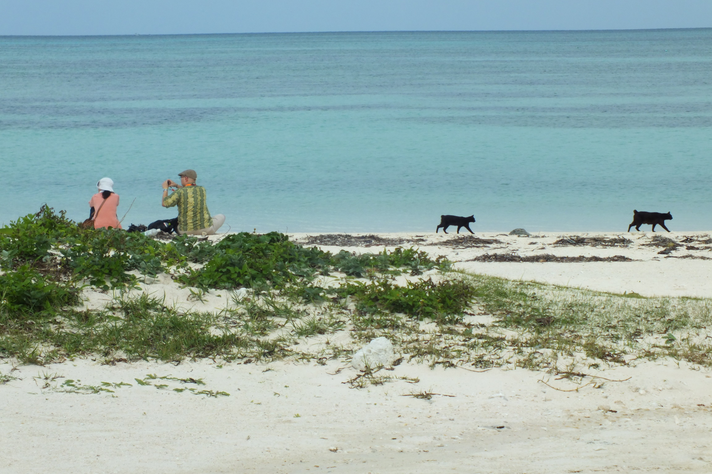 2015-12-20 Kondoi Beach Taketomi-Island,Okinawa コンドイ浜（沖縄県八重山郡竹富町竹富）